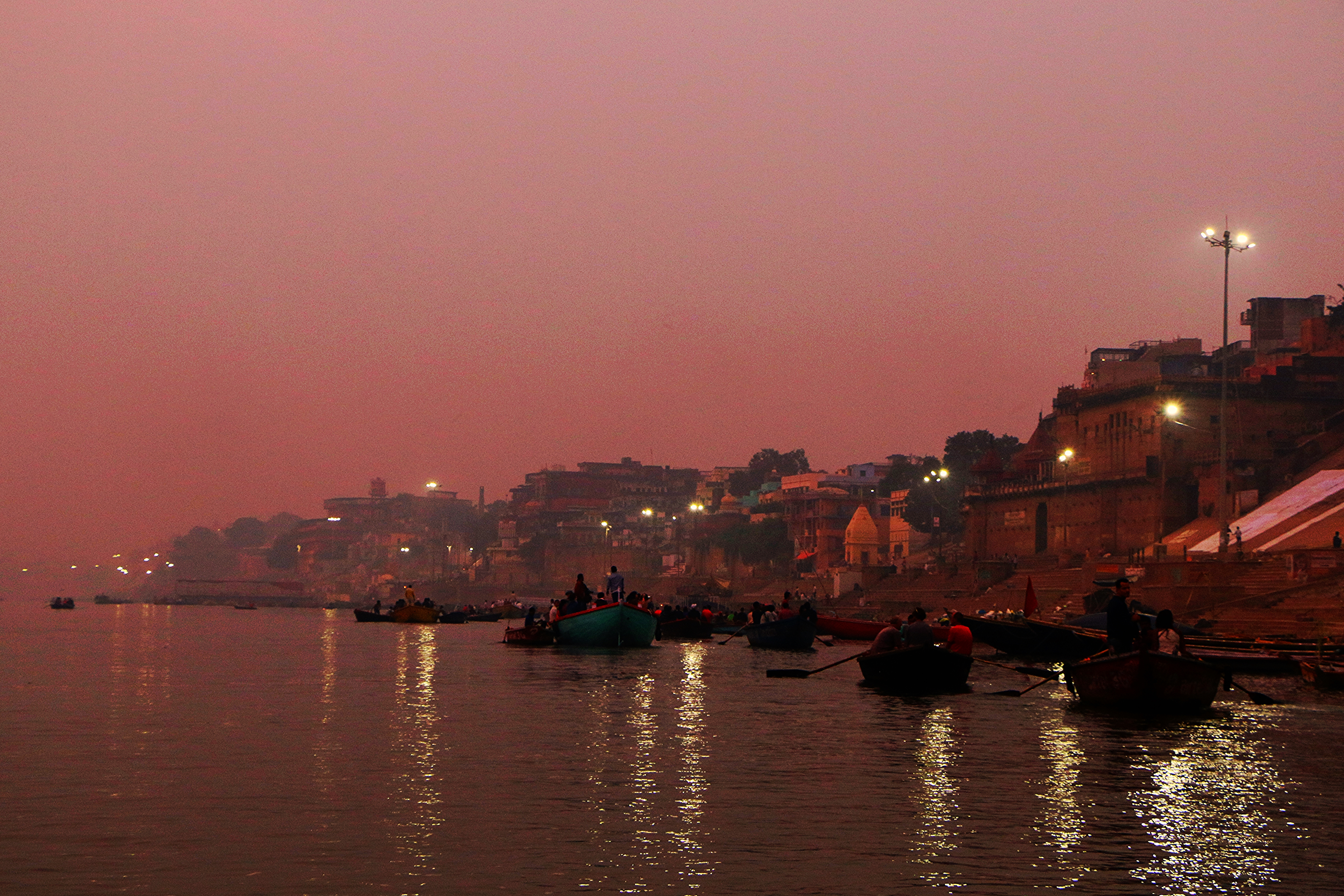 Varanasi, India